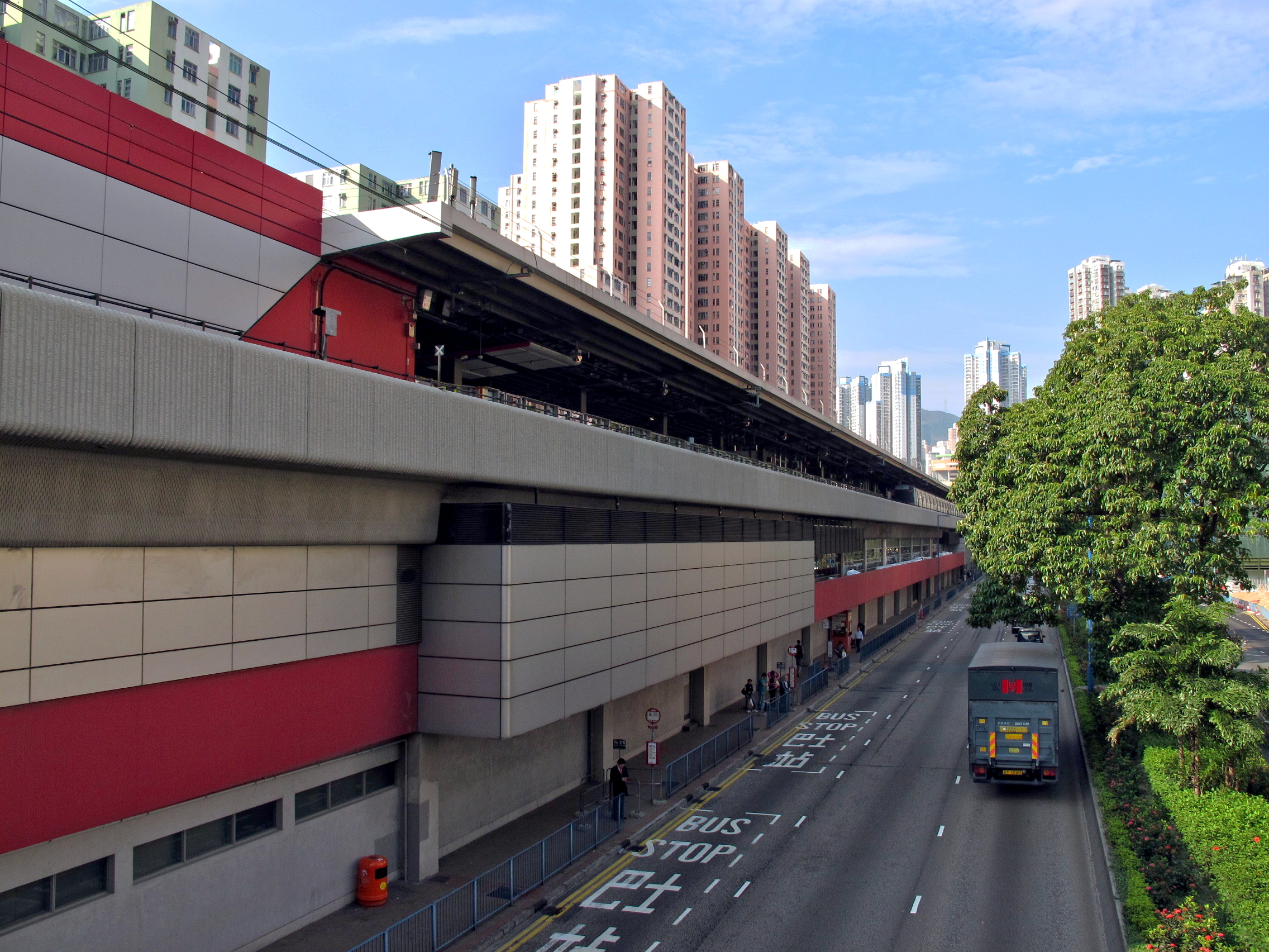 Kowloon Bay Station 九龍灣站外貌